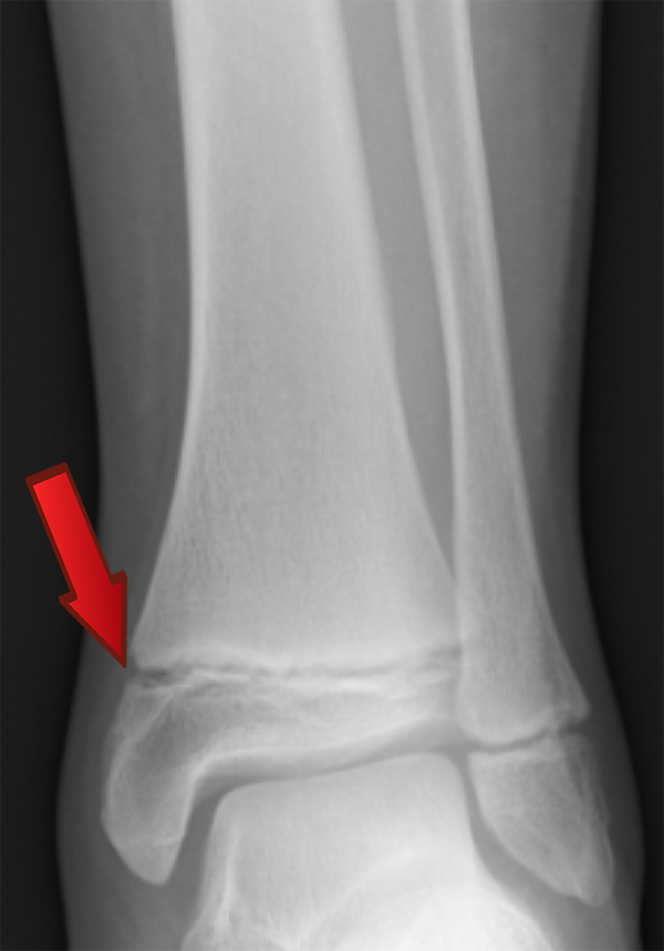 Radiografía de la articulación del tobillo en la que se se señala con una flecha el cartílago de crecimiento inferior de la tibia.